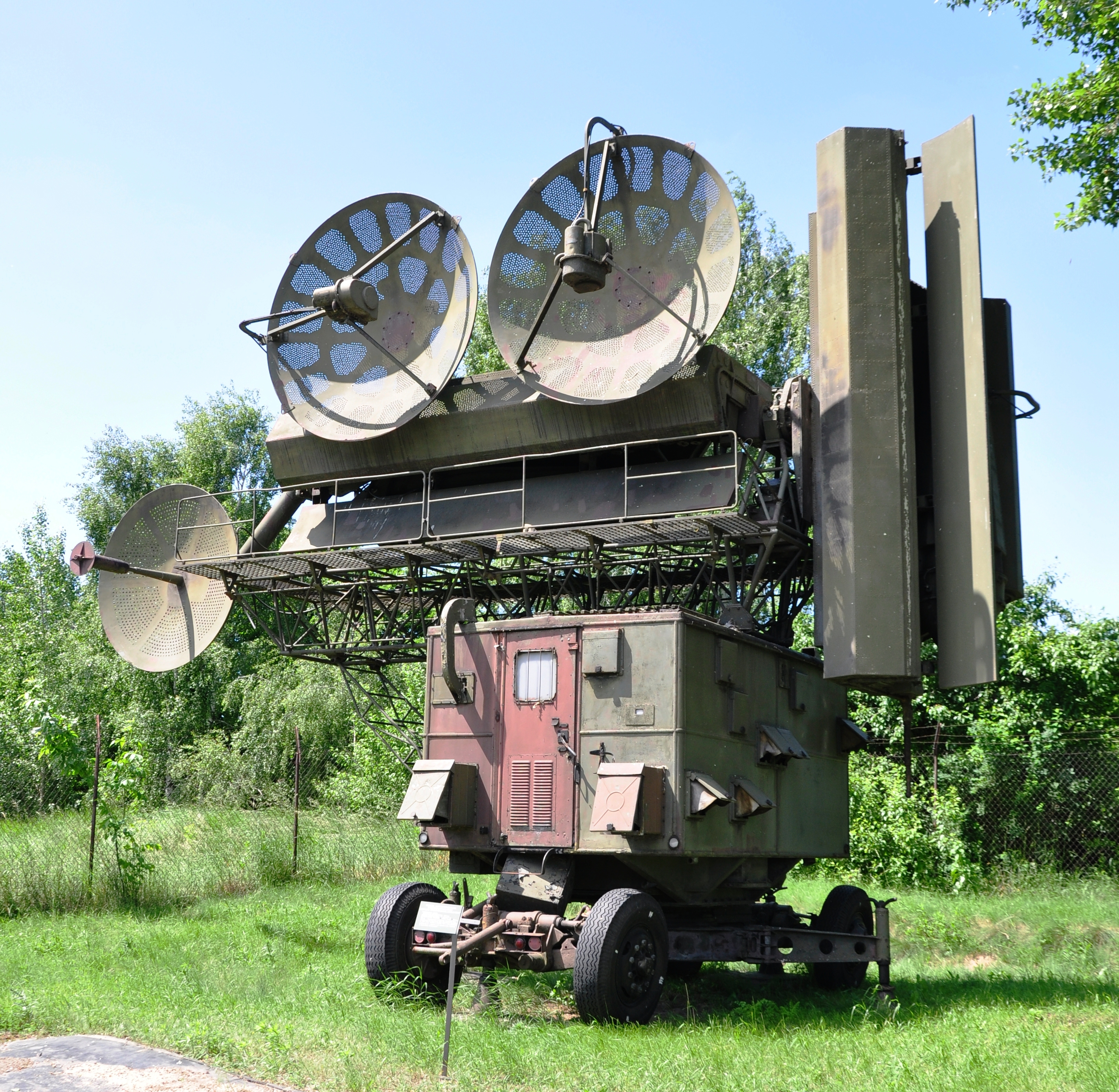 Fort IX Warschau